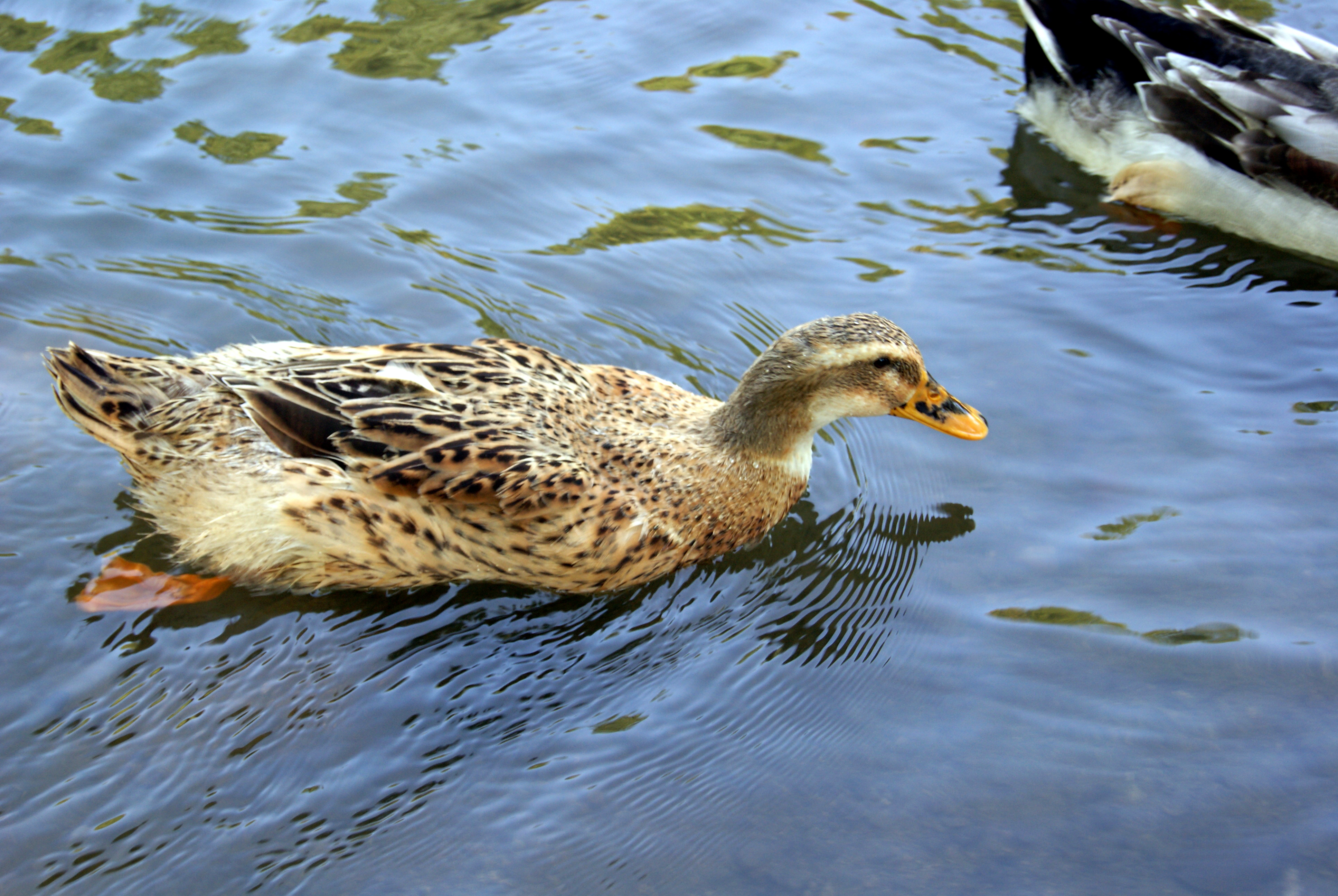 Բադ, Պարզ լիճ